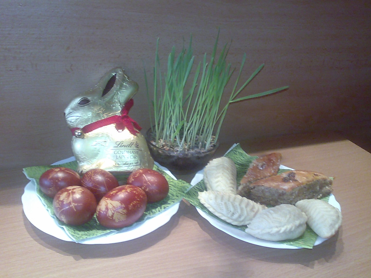 Novruz